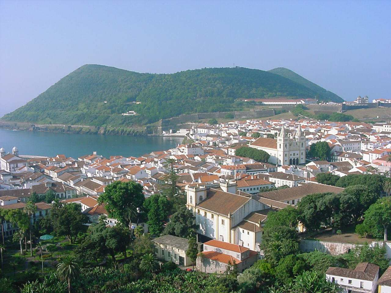 Cidade de Angra do Heroísmo, ilha Terceira, Açores, Portugal.